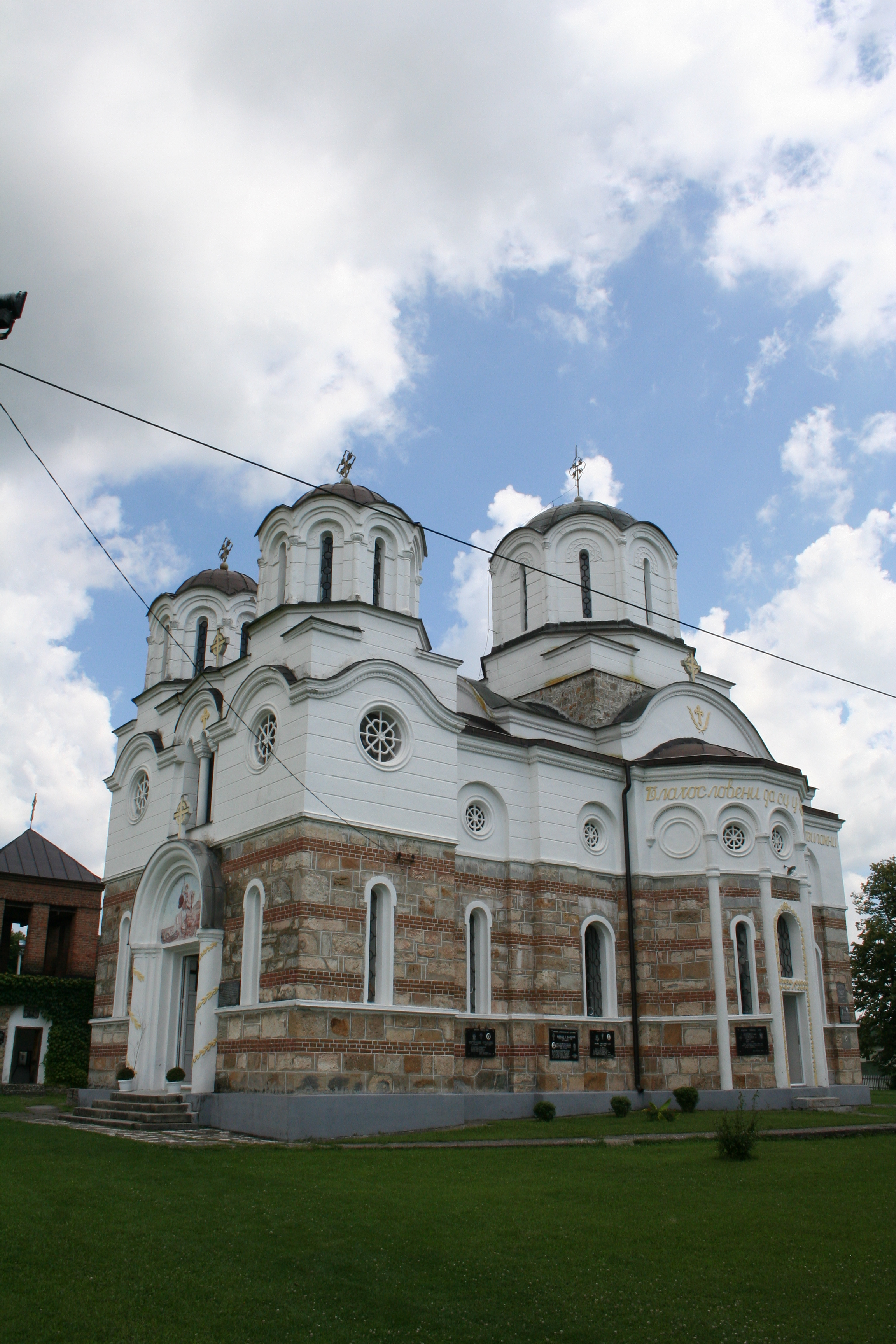 Crkva Sv. Georgija, Draginac